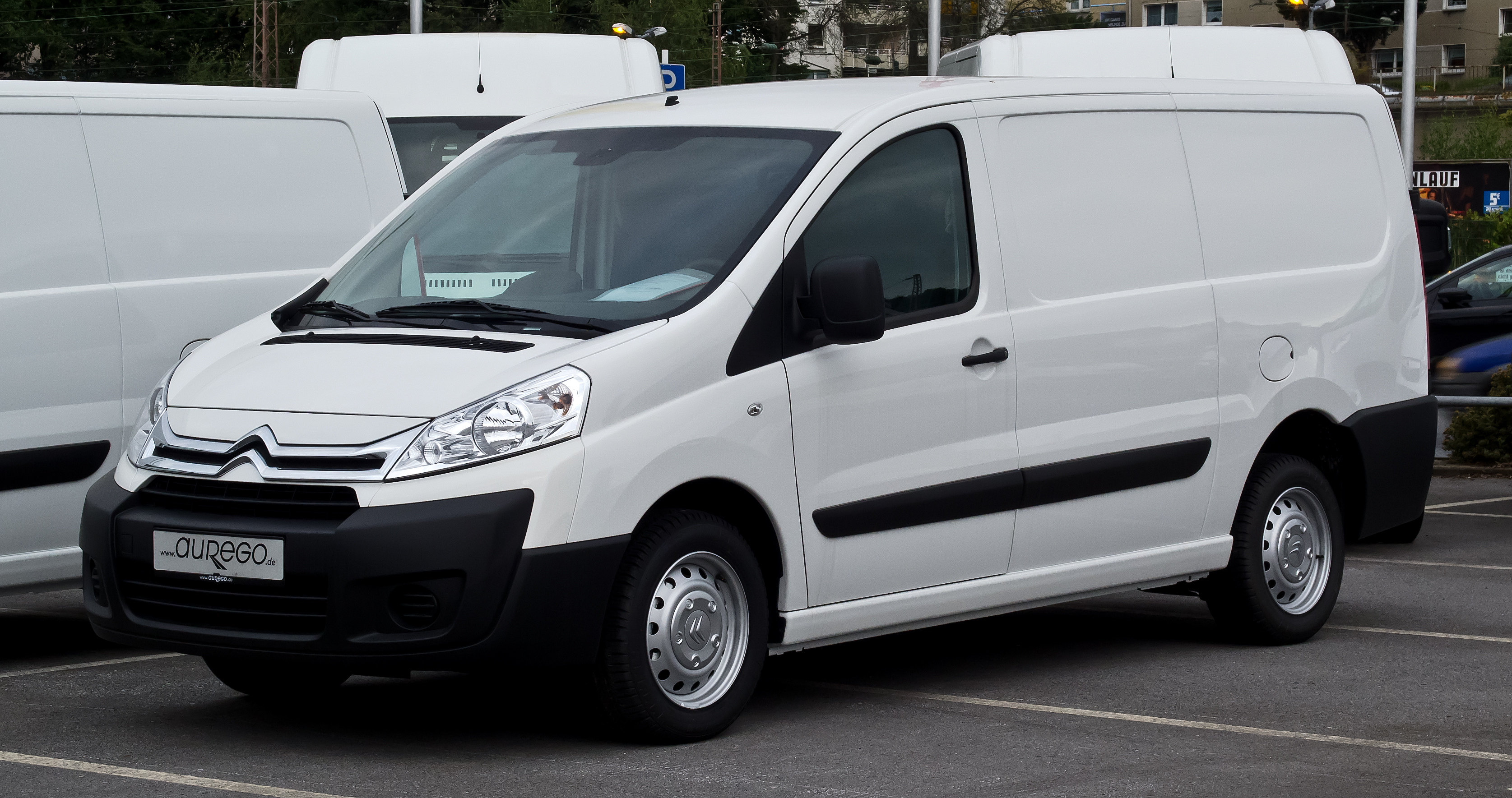 Citroën Jumpy Kastenwagen HDi 125 (II, Facelift)